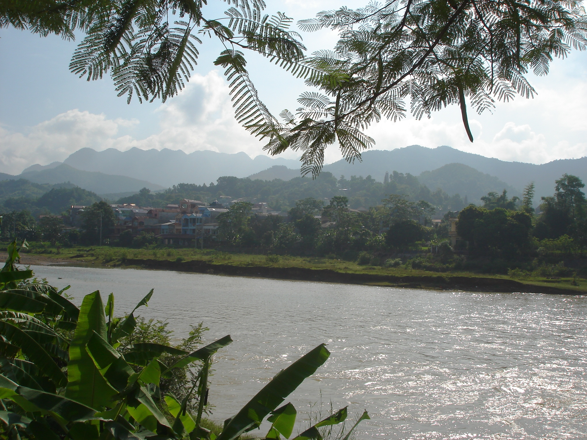 Cao Bang am Morgen